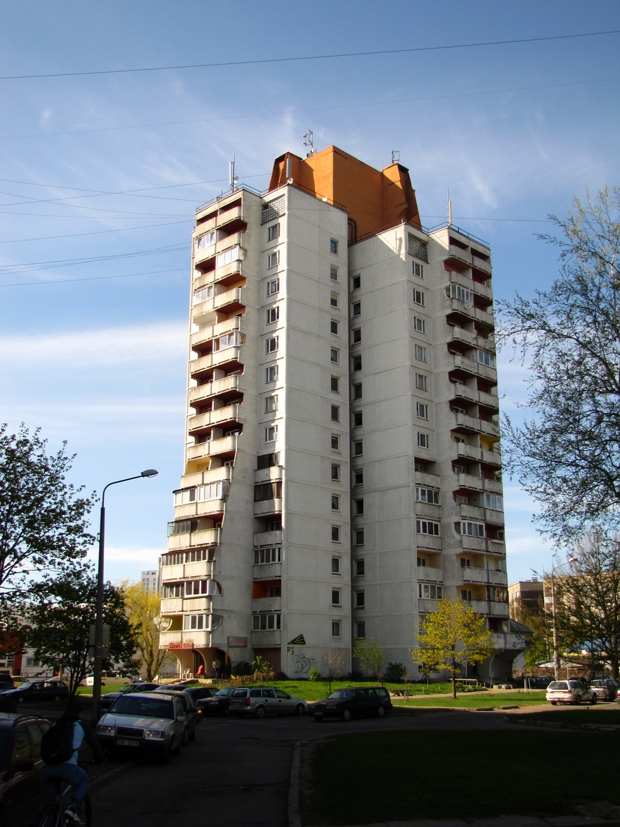 plavnieki